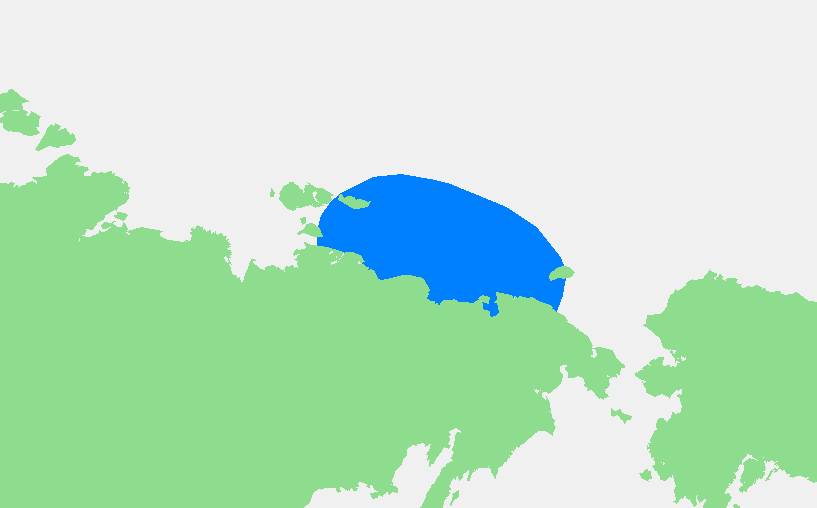 Oost-Siberische zee.PNG